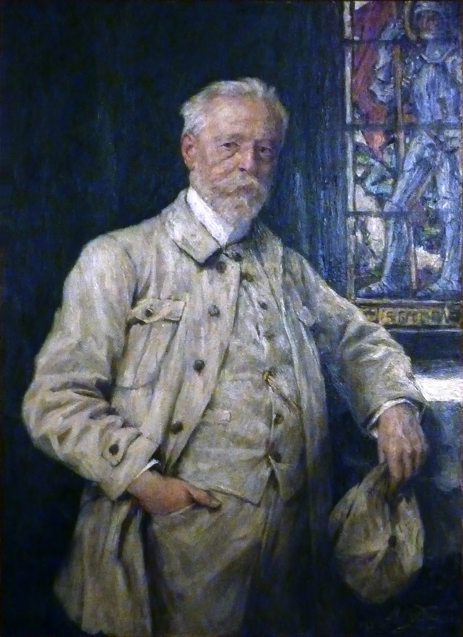 Fritz Geiges. Porträt von Hugo Vogel 1925. Das Gemälde hängt im Historischen Kaufhaus Freiburg.